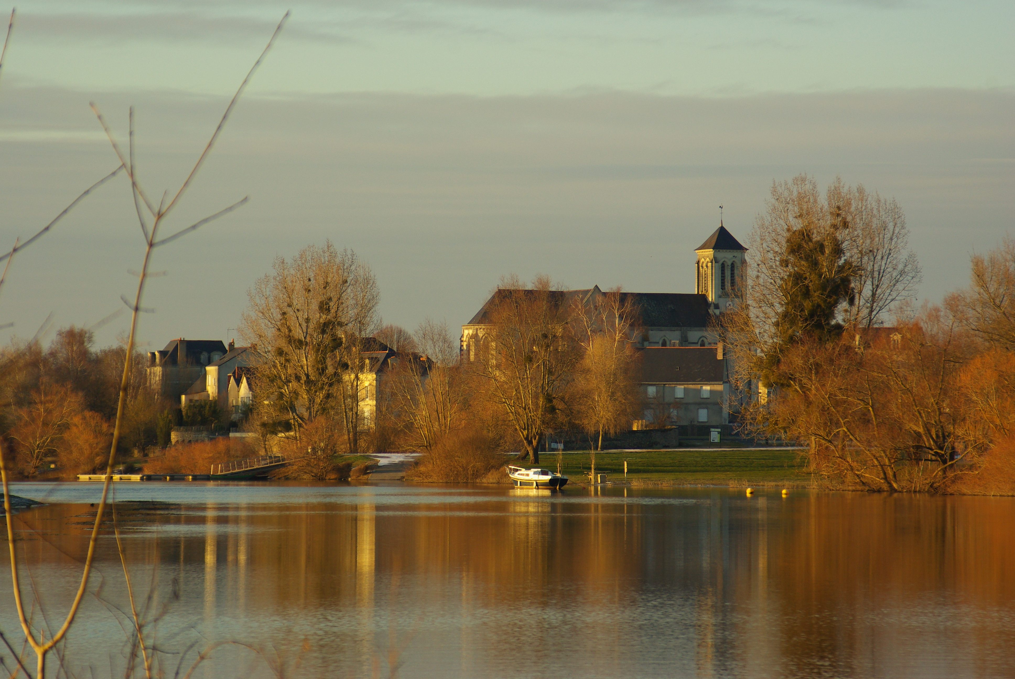 Vue d'Ecouflant depuis le bord de Sarthe